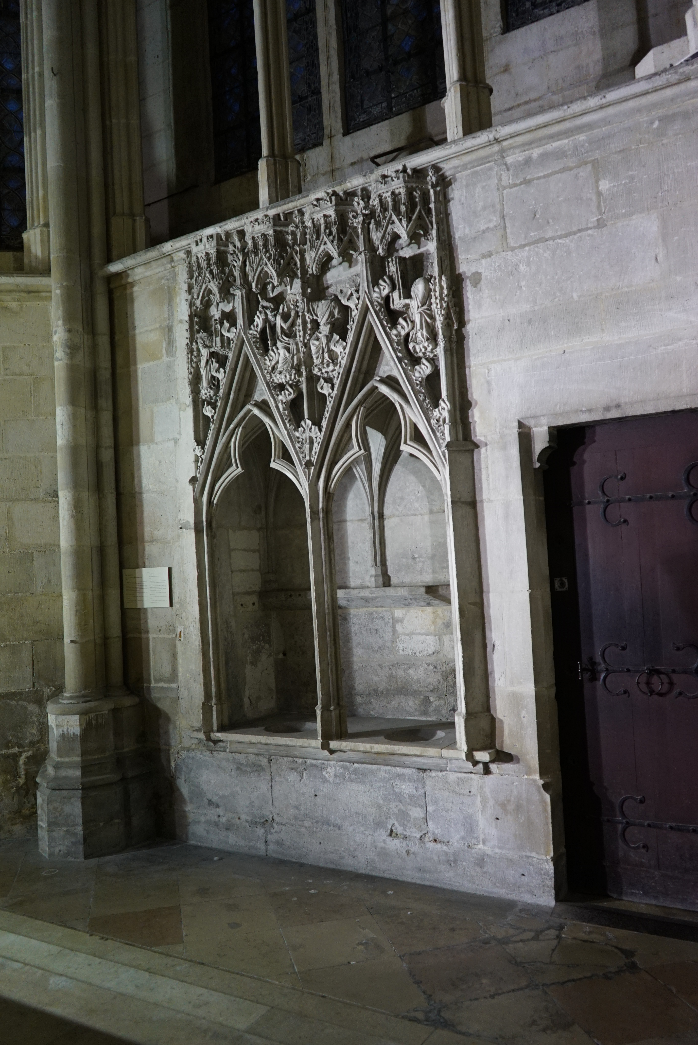 dans la basilique st-Urbain.